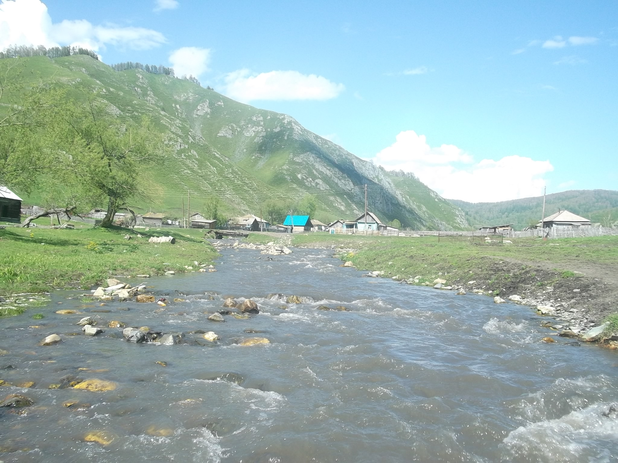 Куевада и с. Демино, лето 2013 г.